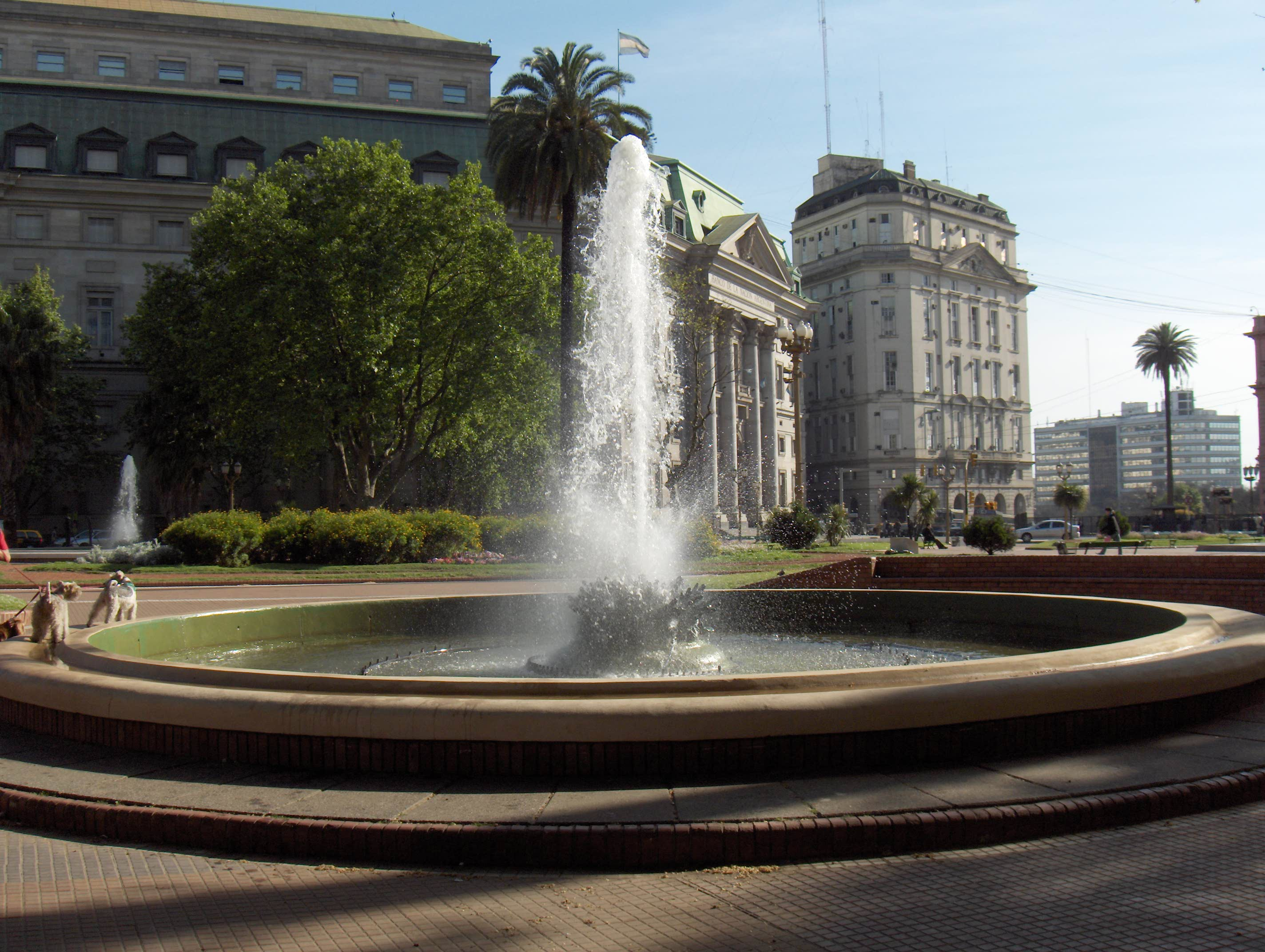 Fuente ubicada en la Plaza de Mayo, Ciudad Buenos Aires, Argentina.